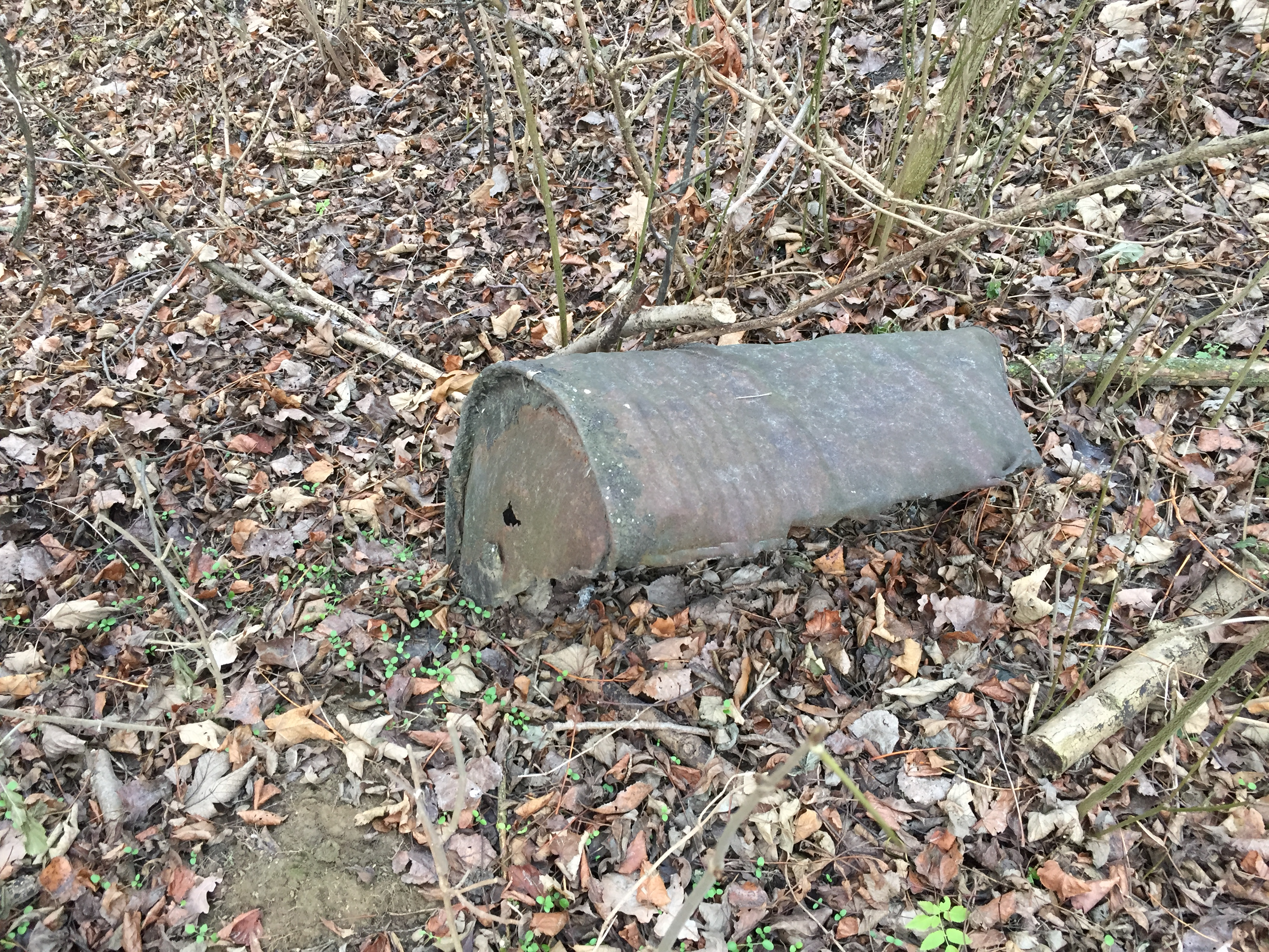 Ölfass im Bereich des ehemaligen Nordwerk